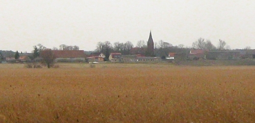 Blick über das Plöwensche Seebruch nach Plöwen (Landkreis Ucker-Randow).